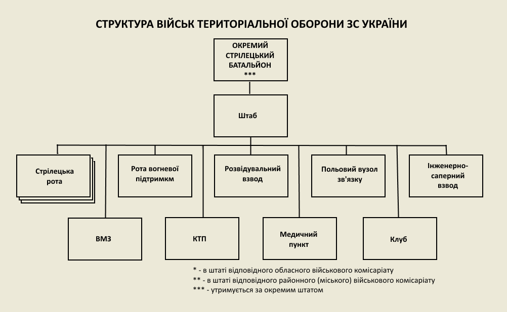 Схема, Структура окремого стрілецького батальйону територіальної оборони